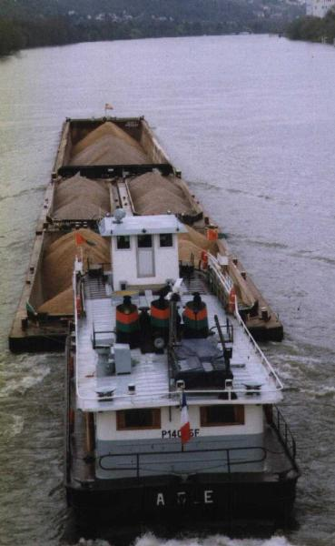 Convoi fluvial sur la Seine (FRANCE). Le Pousseur AIGLE pousse 5 barges de granulats